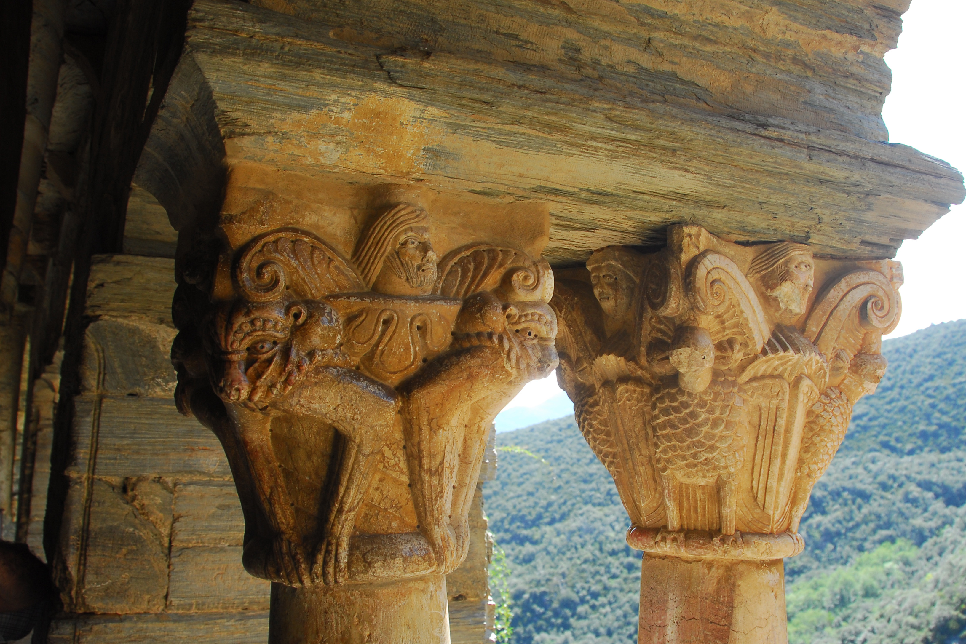 Serrabone, Kreuzgang, Kapitell Nr. 3+4